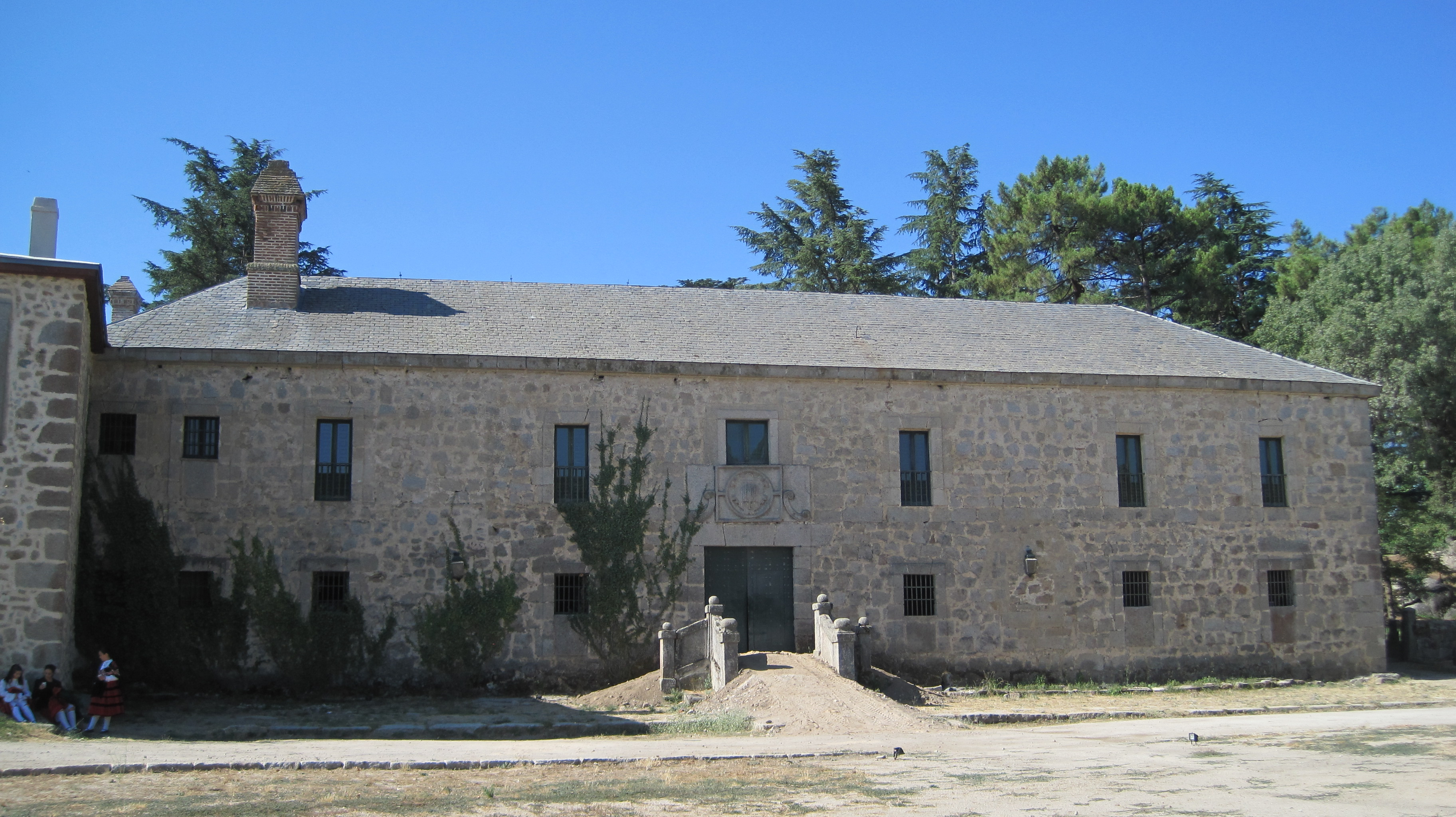 Casa de La Granjilla, en El Escorial (Madrid, España).